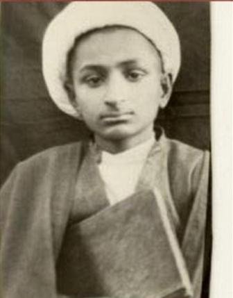 نوجوانی آیت الله محمد تقی بهجت فومنی